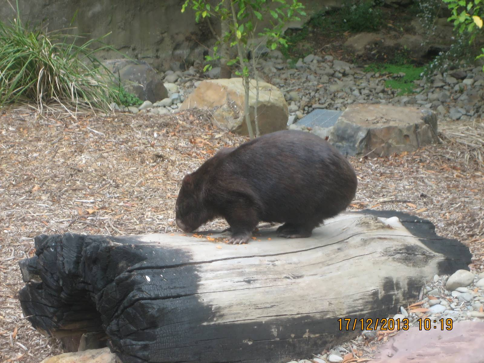 Хілсвілл (заповідник)